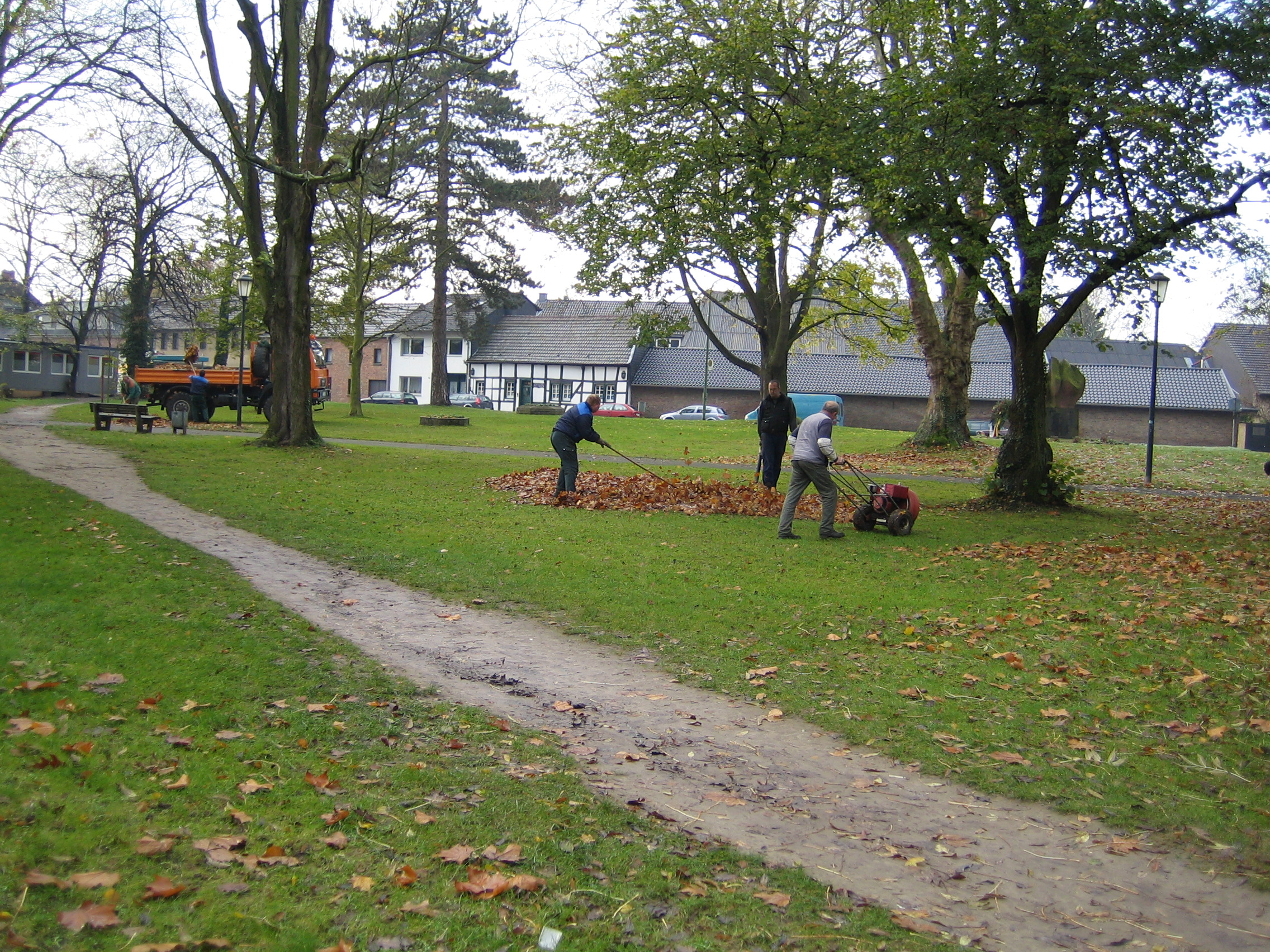 Burgpark Nörvenich